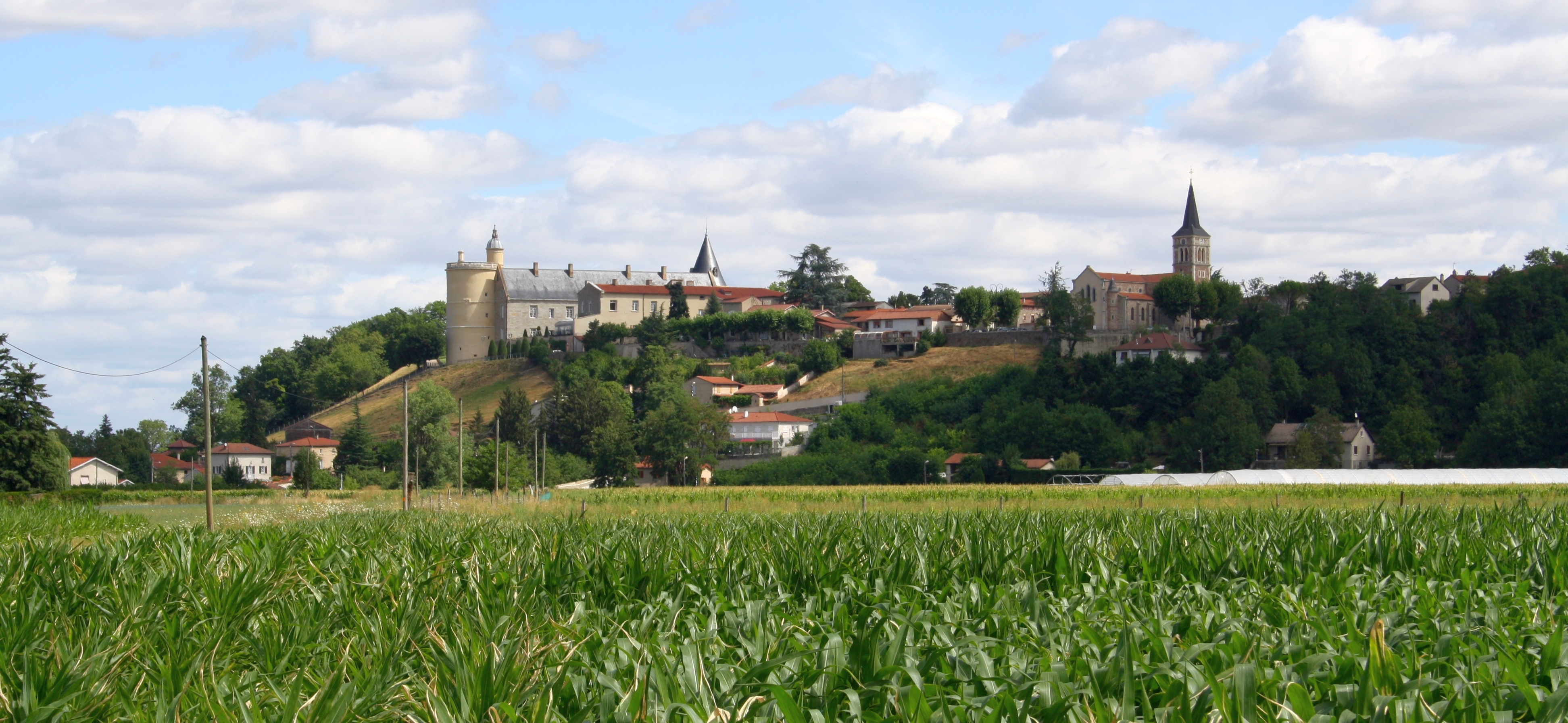 Bouthéon, son château et son église